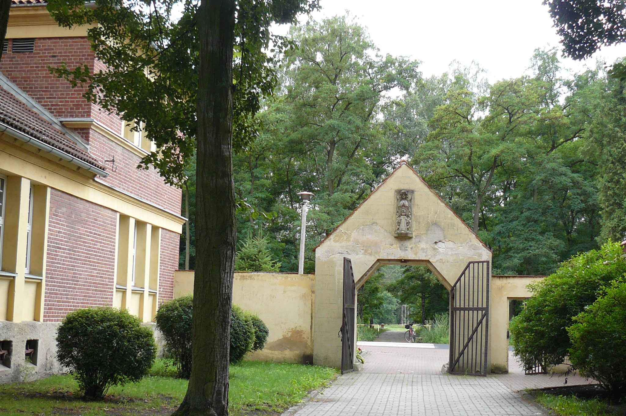 Młodzieżowy Ośrodek Wychowawczy im. Janusza Korczaka w Antoniewie (1914r., brama z 1938r.).